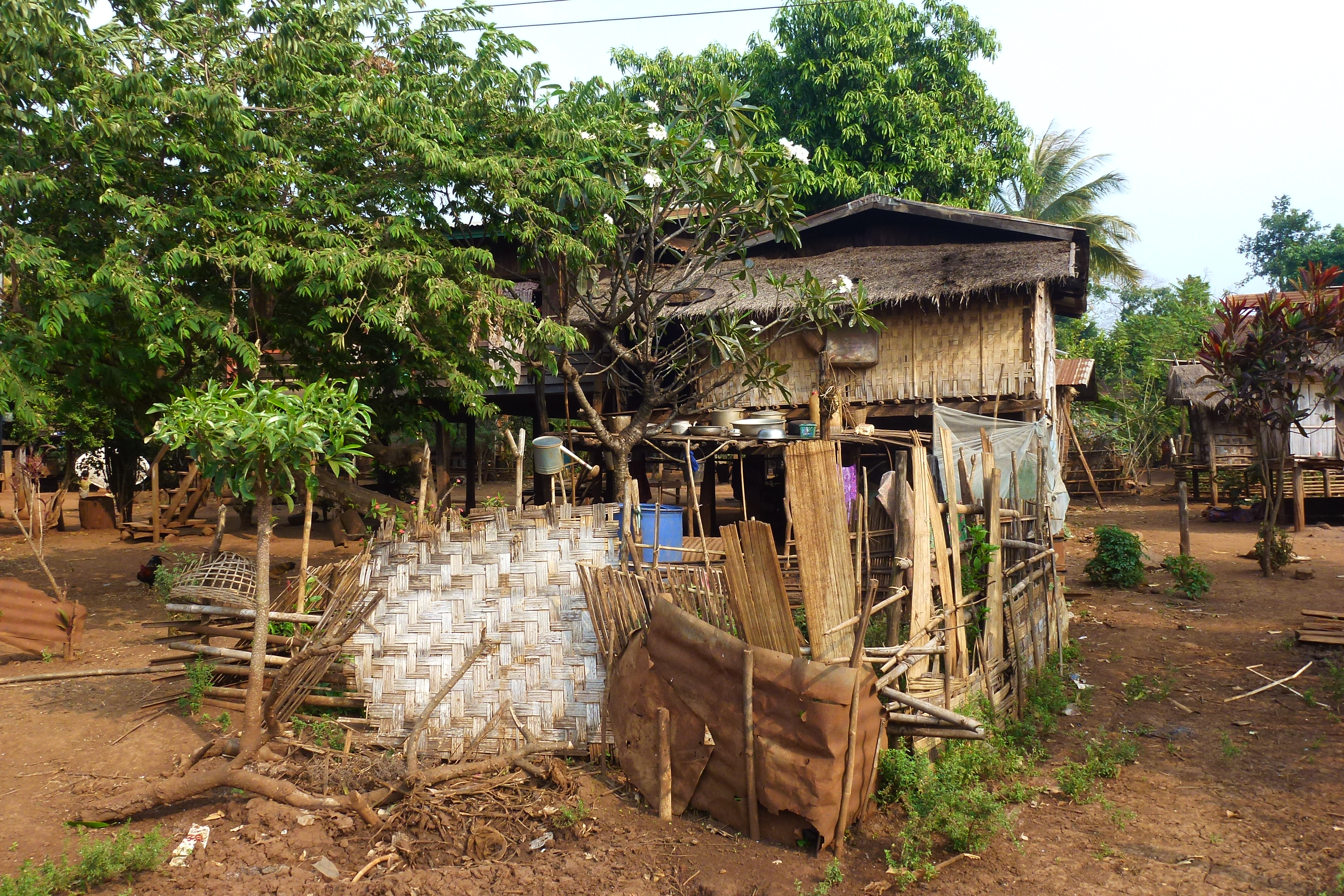 Houayhe le village des forgerons Alak.- Salavan Province Laos.